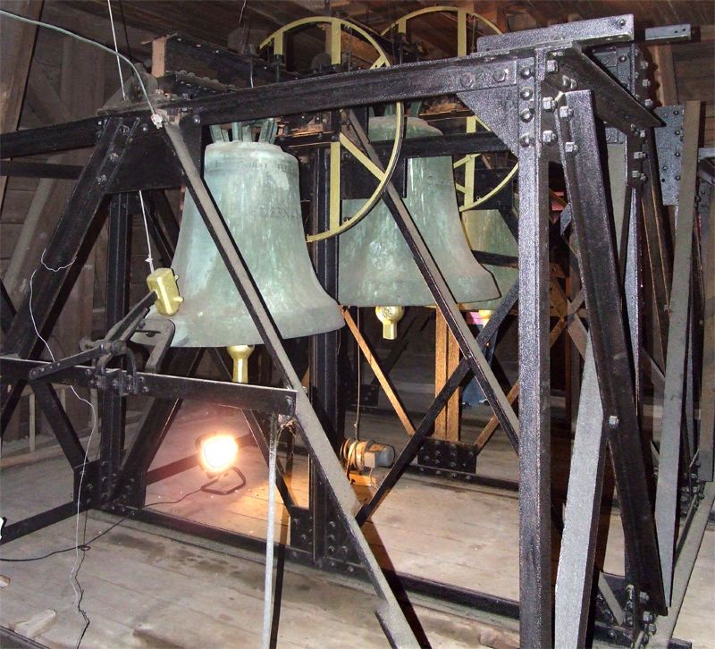 Geläut von 1954 im Glockenturm Bechtolsheim. Hoffnung - Glaube - Liebe